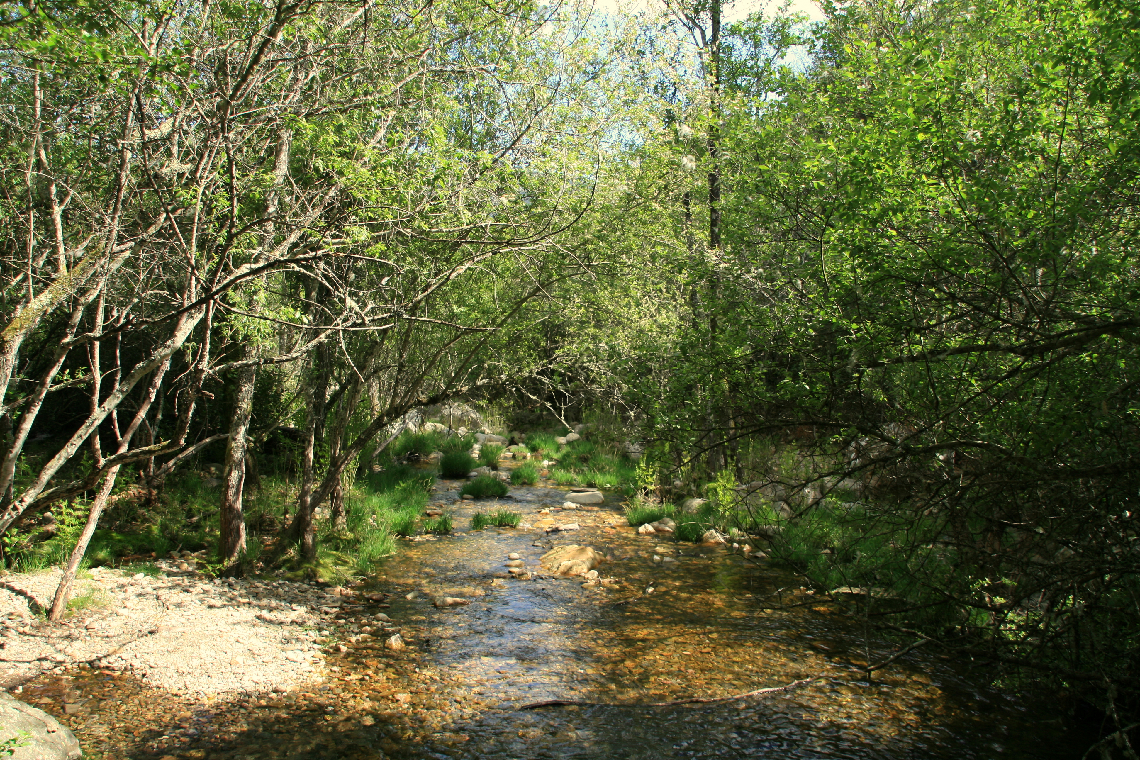 Río Batuecas This is a photography of a Site of Community Importance in Spain with the ID: ES4150107. Natura2000 entry, EEA entry